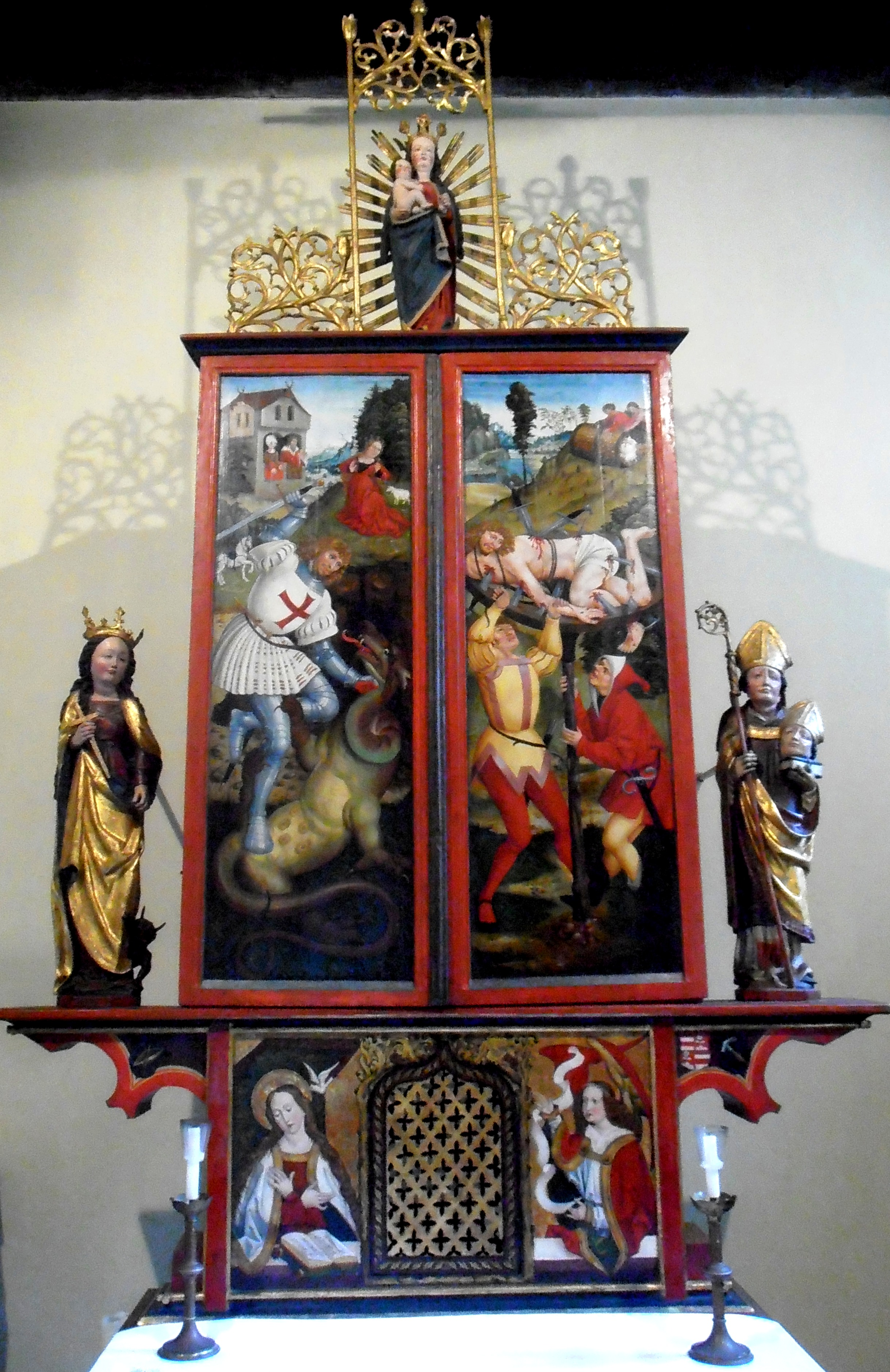 Altar von 1510 Werktagsseite (geschlossen) in St. Georg (alt) Muenchen-Milbertshofen